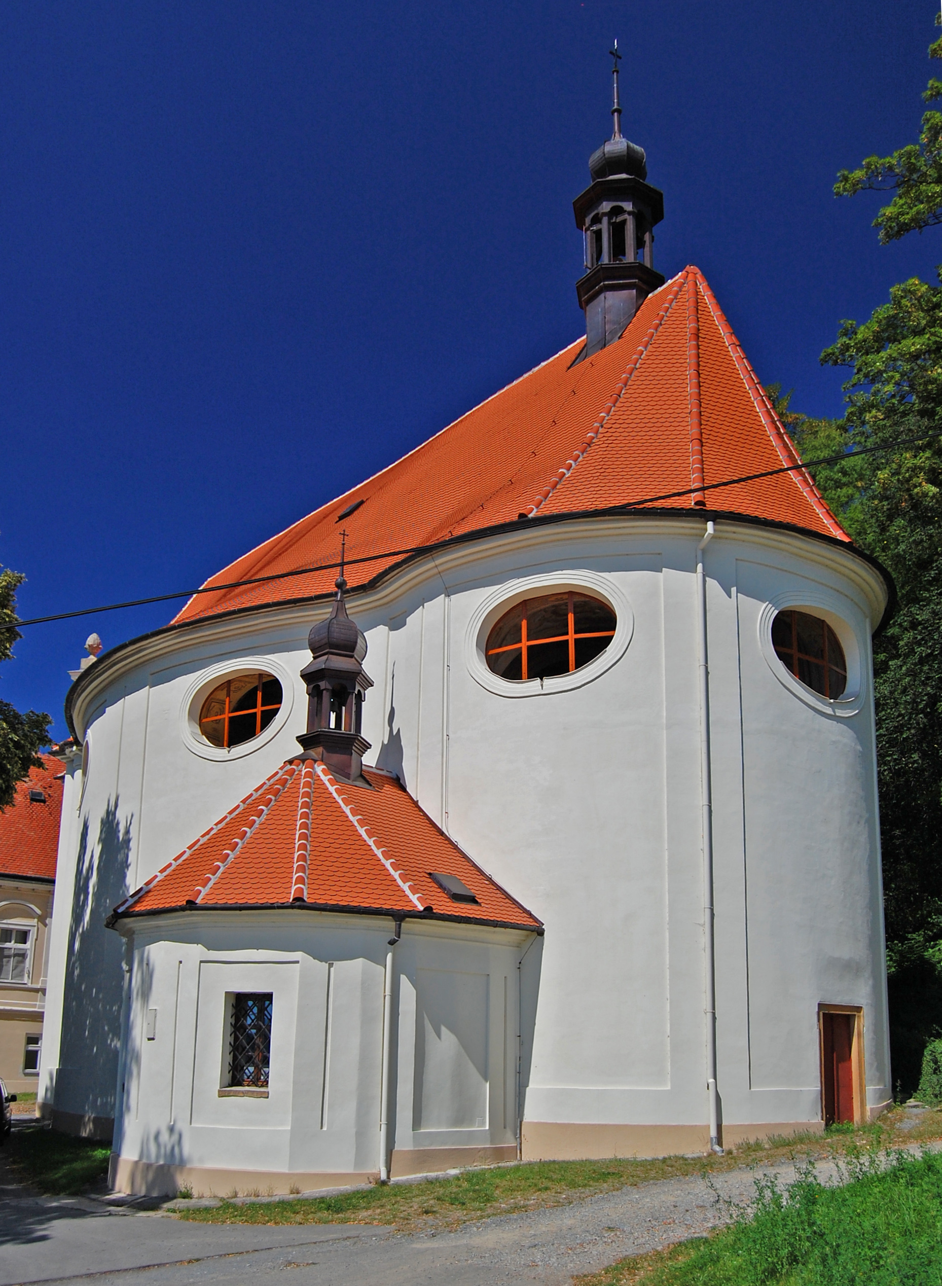 Kostel svatého Libora - zadní pohled, Jesenec, okres Prostějov